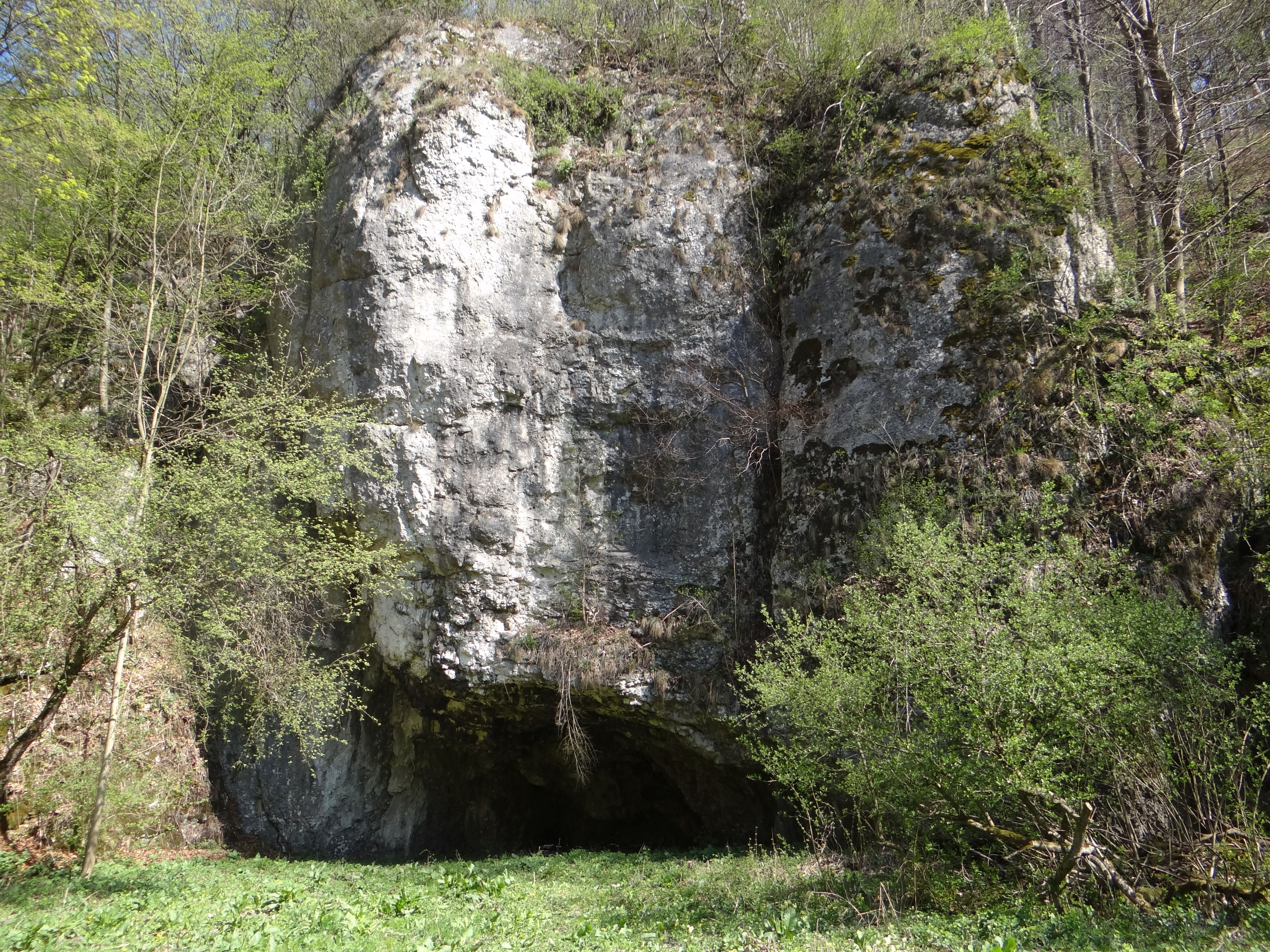 Skały Framugi w Dolinie Sąspowskiej i schronisko Przy Łące